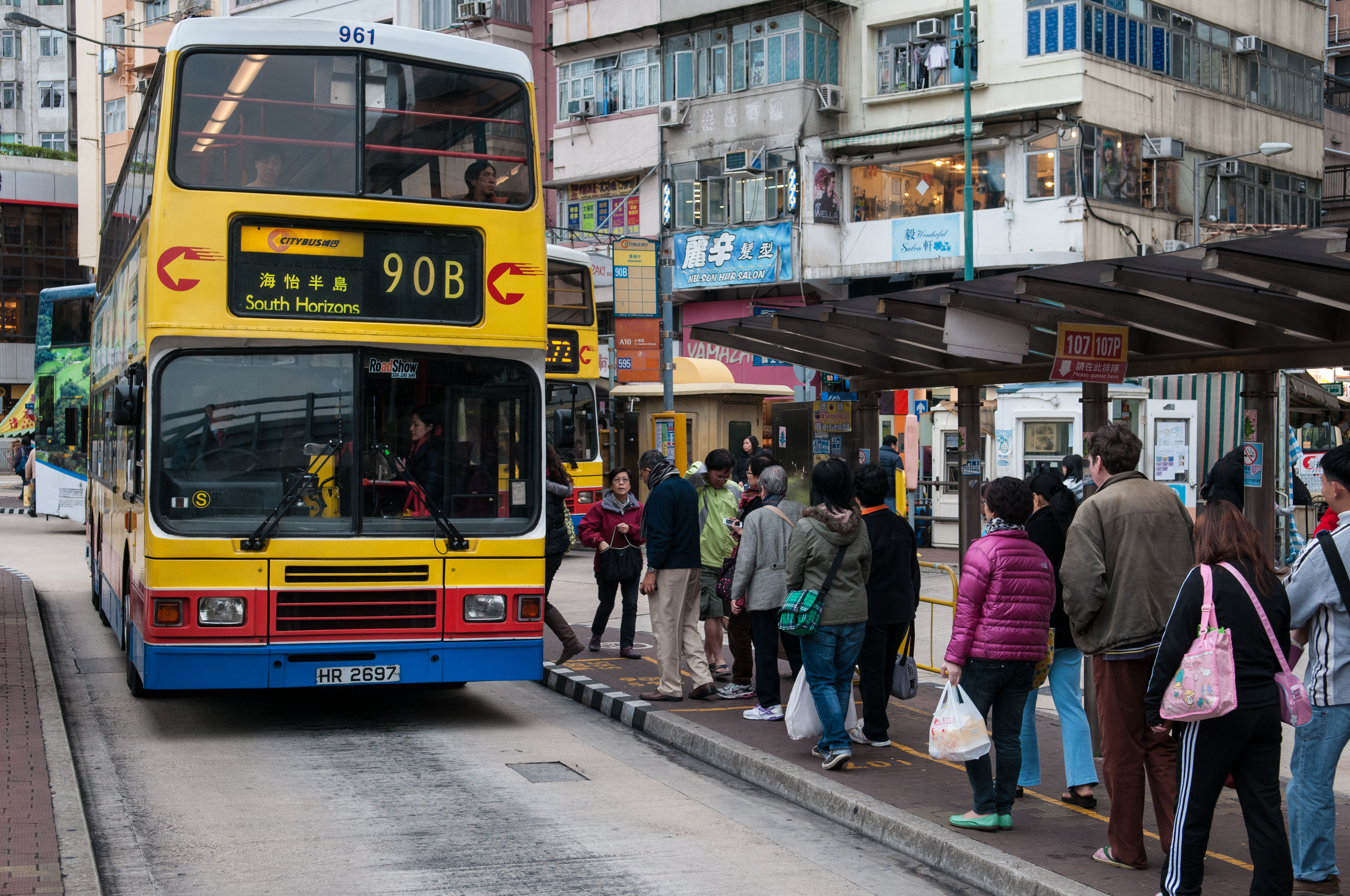 Aberdeen bus stop, Hong Kong